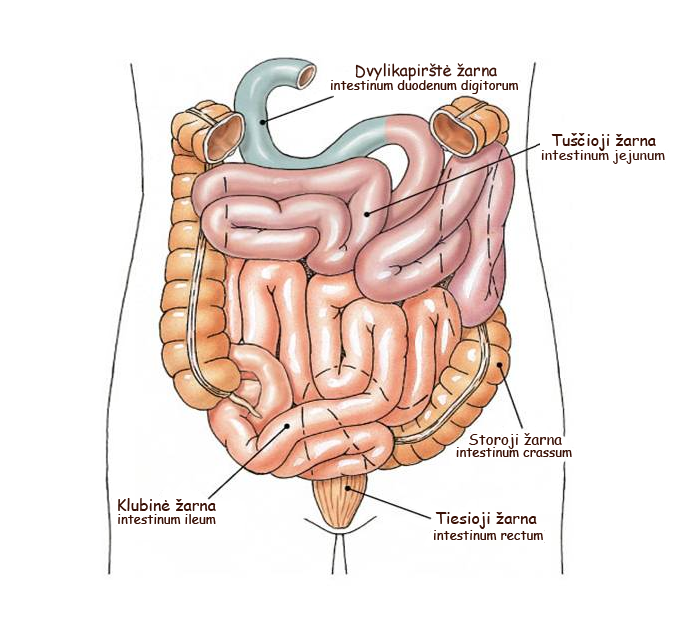 Žmogaus žarnyno dalys